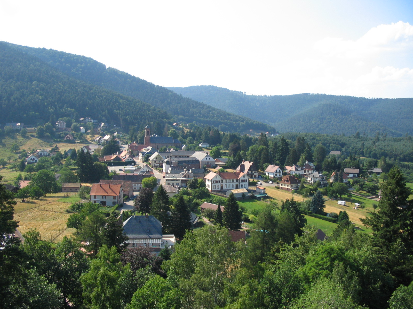 Le village de Wangenbourg vu du château.